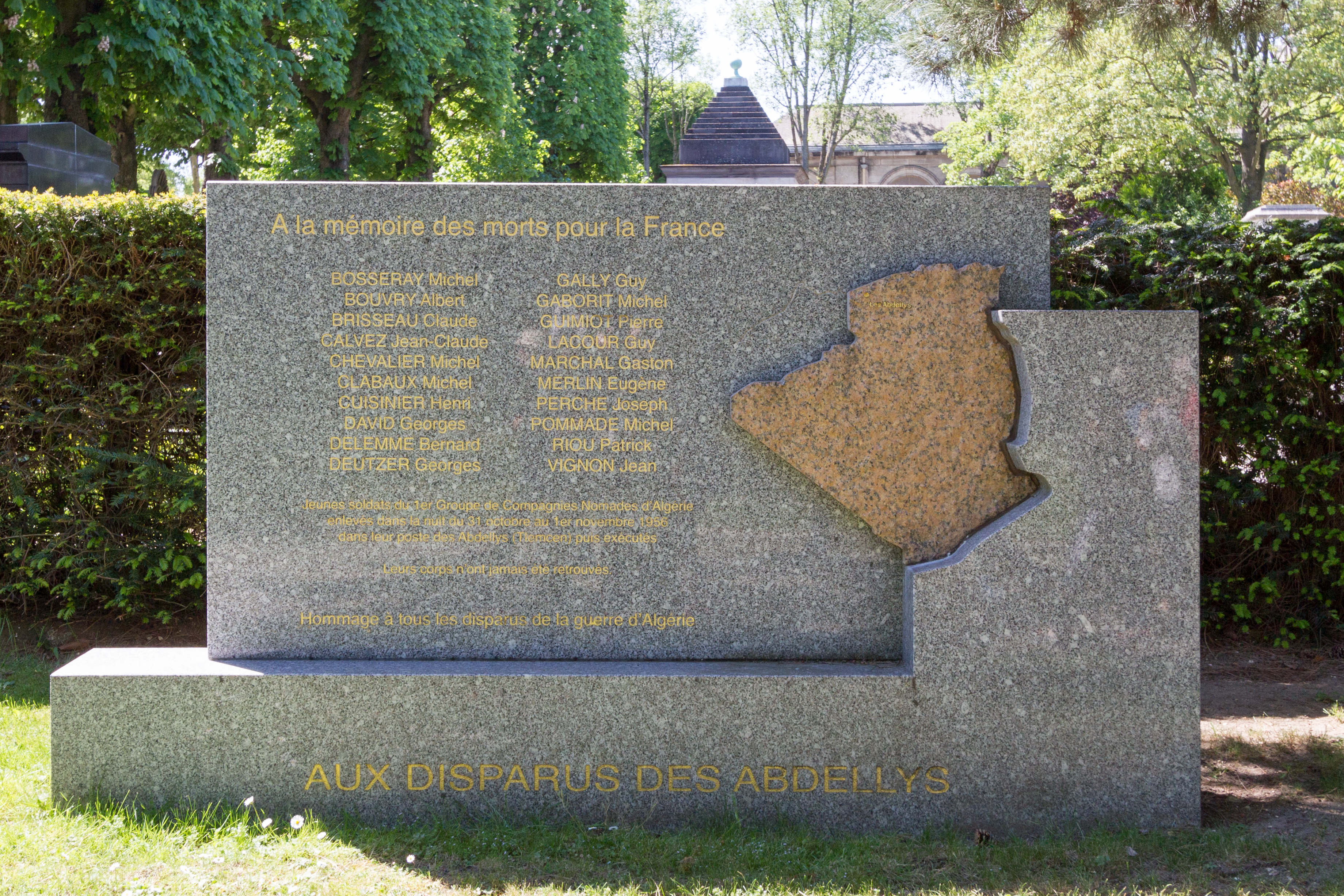 Monument aux soldats du 1er groupe de Compagnies nomades d'Algérie disparus dans la nuit du 31 octobre 1956 aux Abdellys (Tlemcent).